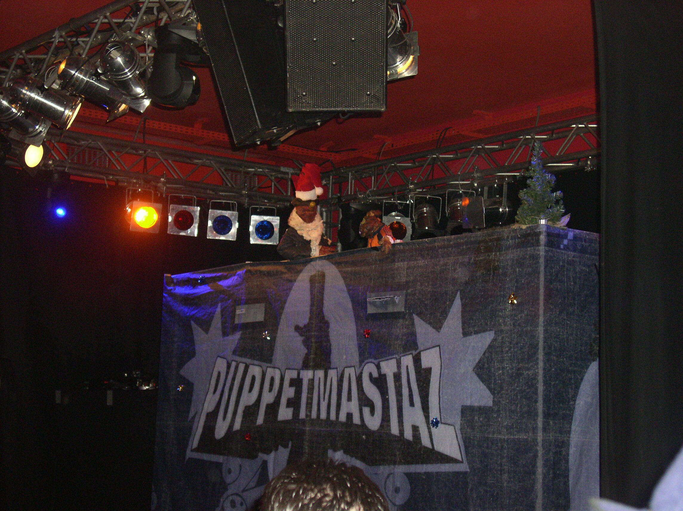 Puppetmastaz beim Weihnachtskonzert am 24.12.2004 in der Kulturbrauerei, Berlin.